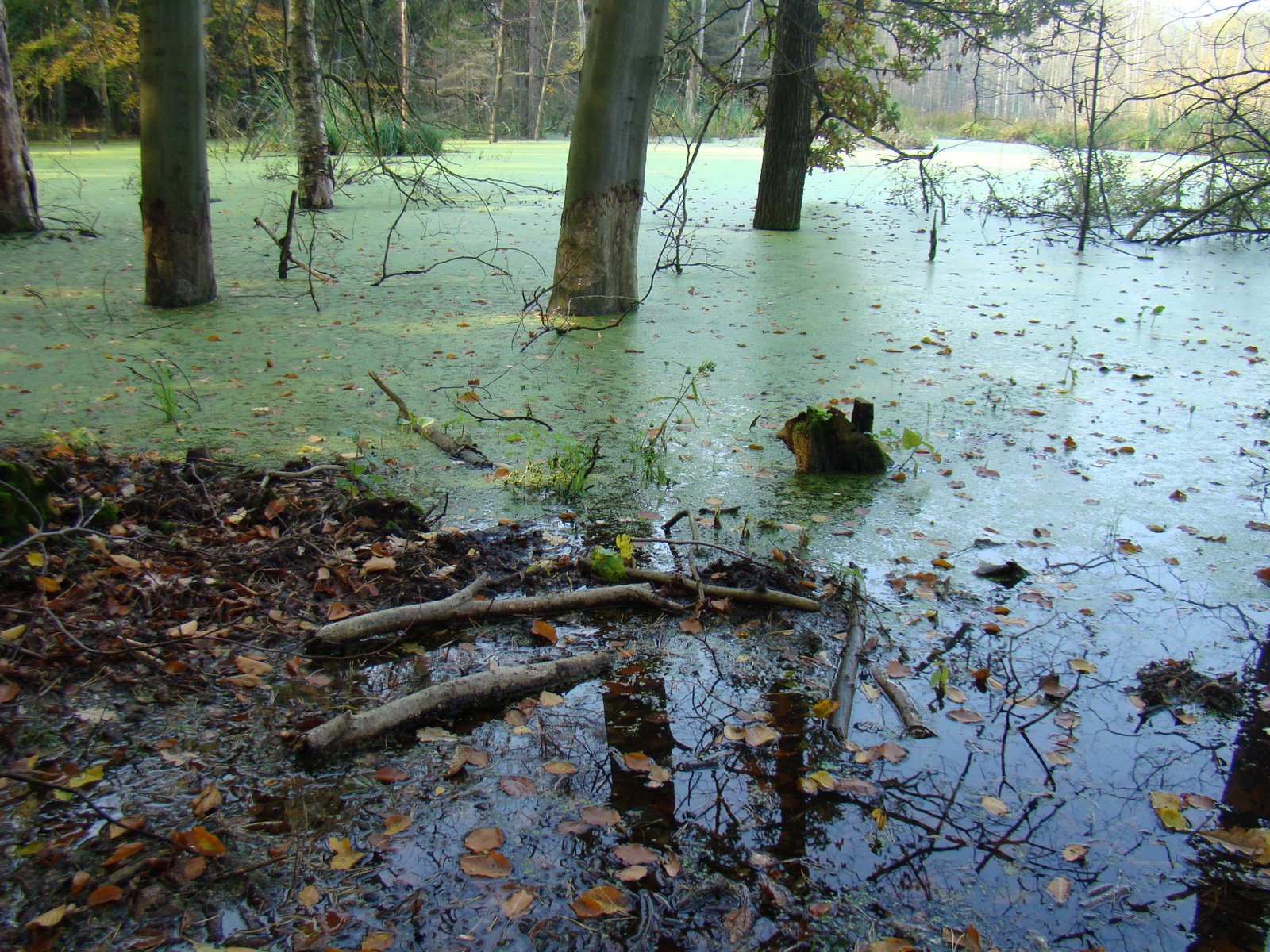 "Bórbagno Miałka" Iński Park Krajobrazowy